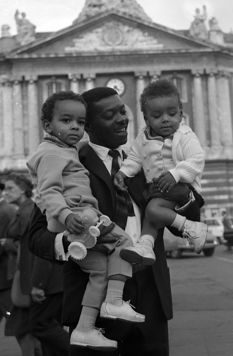 Place du Capitole. Entre 15 et 18 octobre 1962. Samuel Edimo (joueur du Toulouse Football Club) en famille. Au 1er plan vue de face du joueur tenant ses deux enfants dans les bras ; en arrière-plan le Capitole.